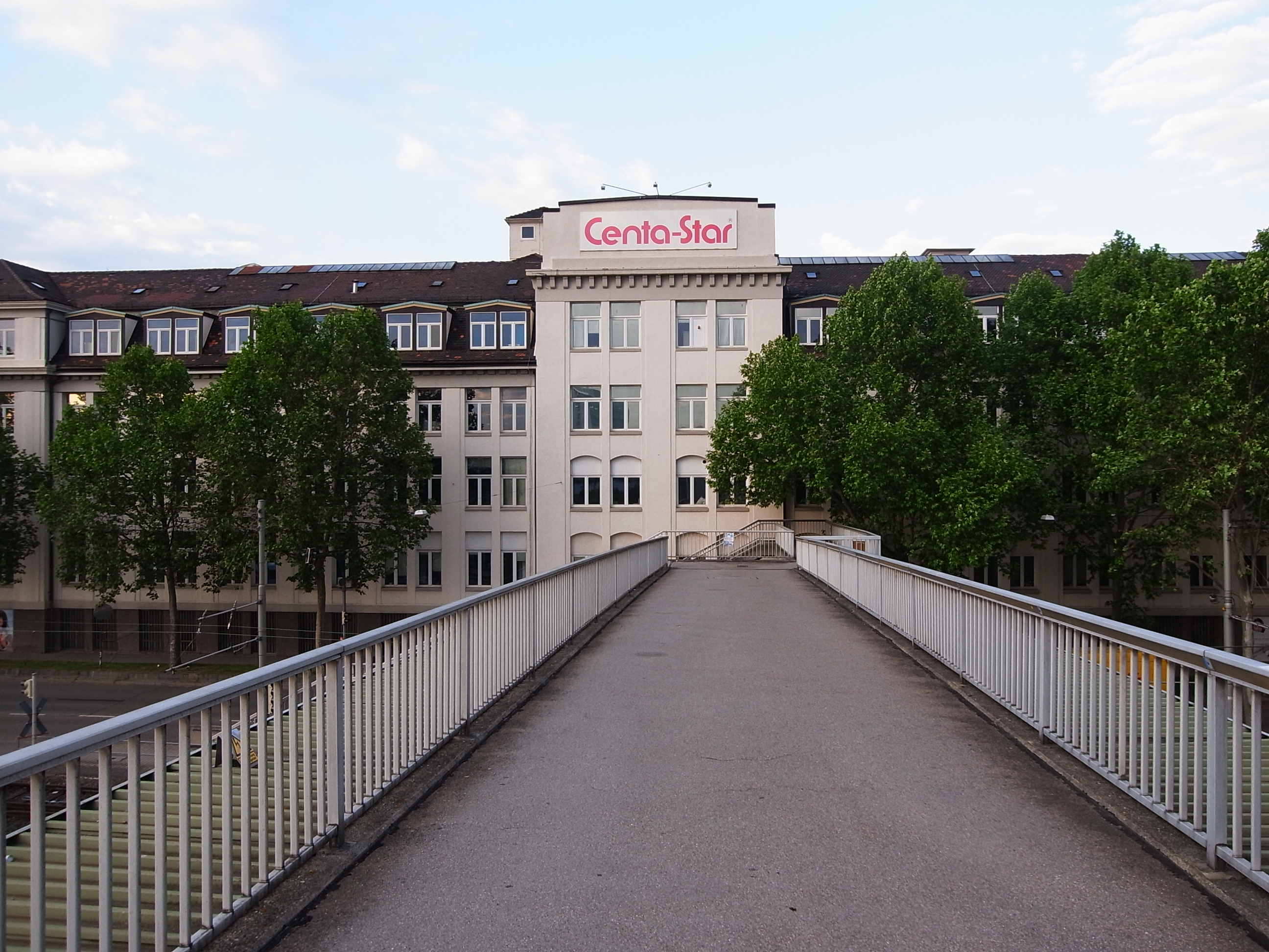 Frontansicht der ehemaligen Eszet-Werke